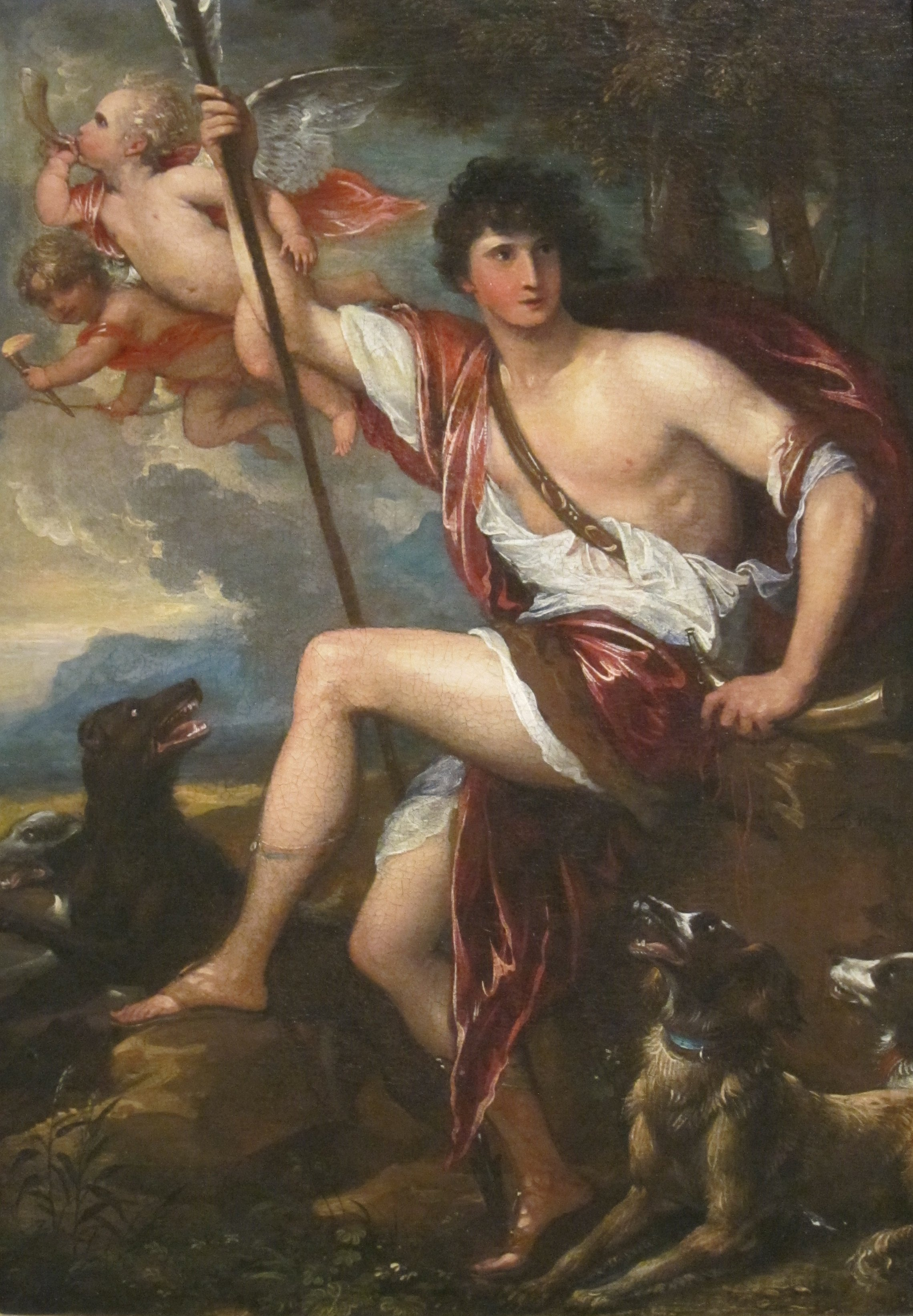 Adonis